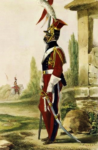 Lancier rouge de la Garde impériale en grande tenue.